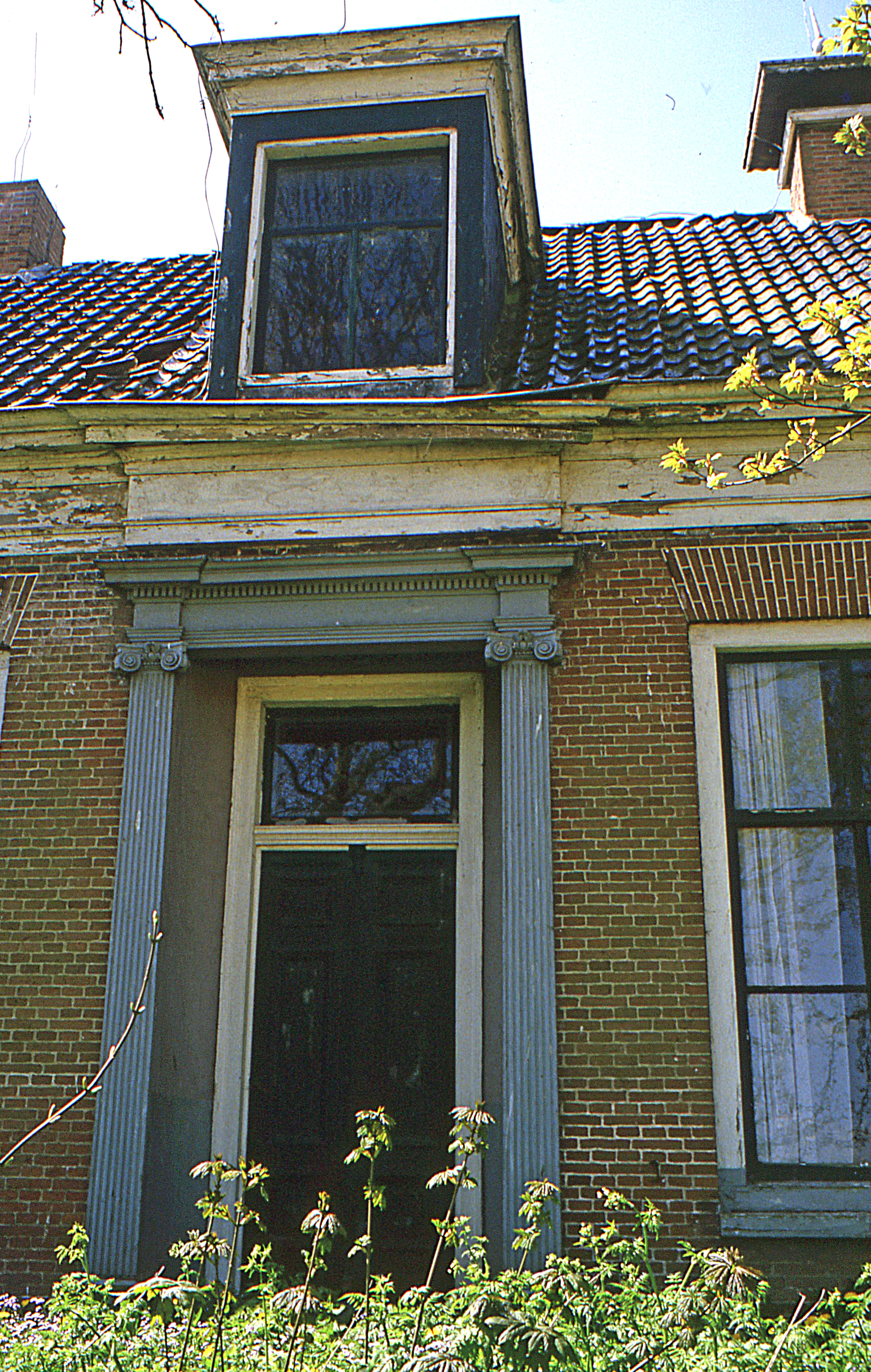 De omlijste hoofdingang van Landstra's pleats met daarboven een wrakke goot en een dakkapel met achterstallig onderhoud.